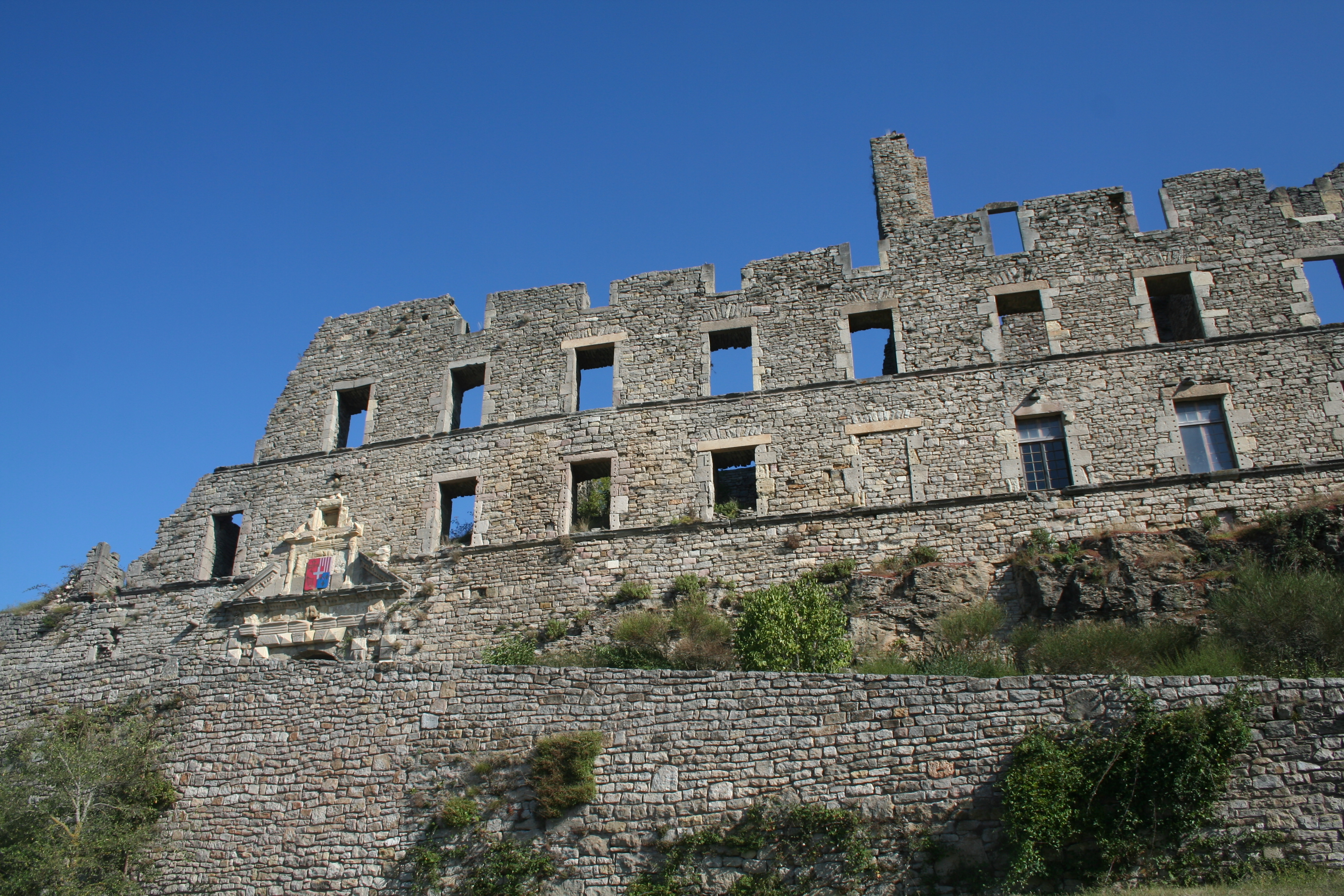 Sévérac-le-Château (Aveyron) - façade du château.